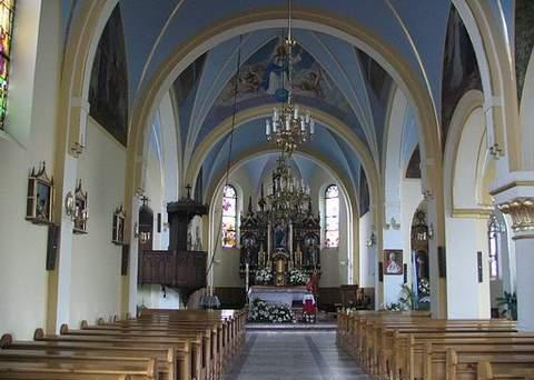 Wewnątrz kościoła w Bielczy